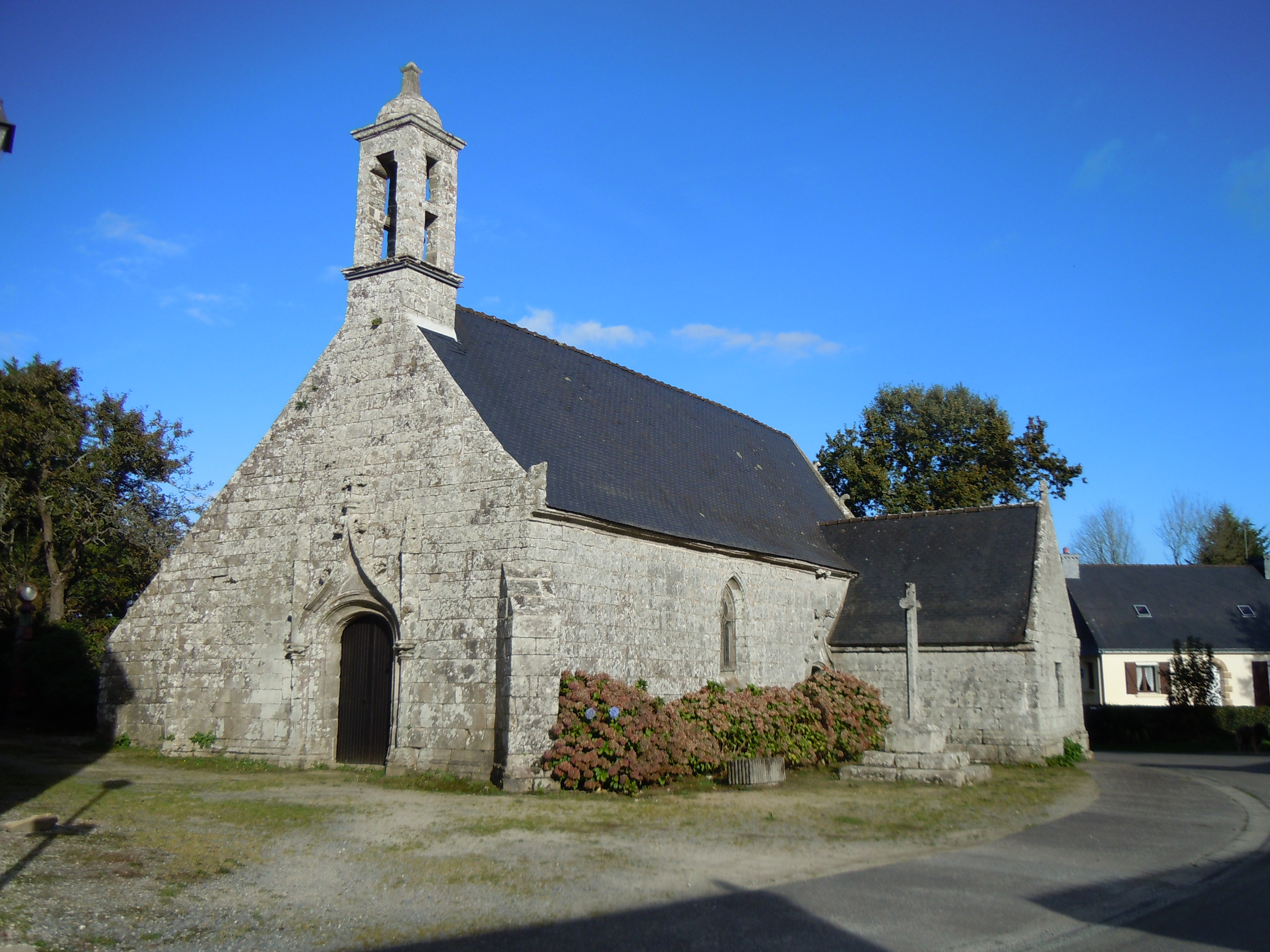 chapelle Saint-Jacques de Bannalec (département du Finistère)